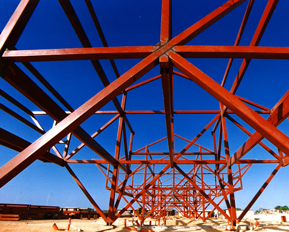 Estructura de construcción realizada con el sistema modular de construcción Oraaflex registrada por Cesar García Urbano Taylor